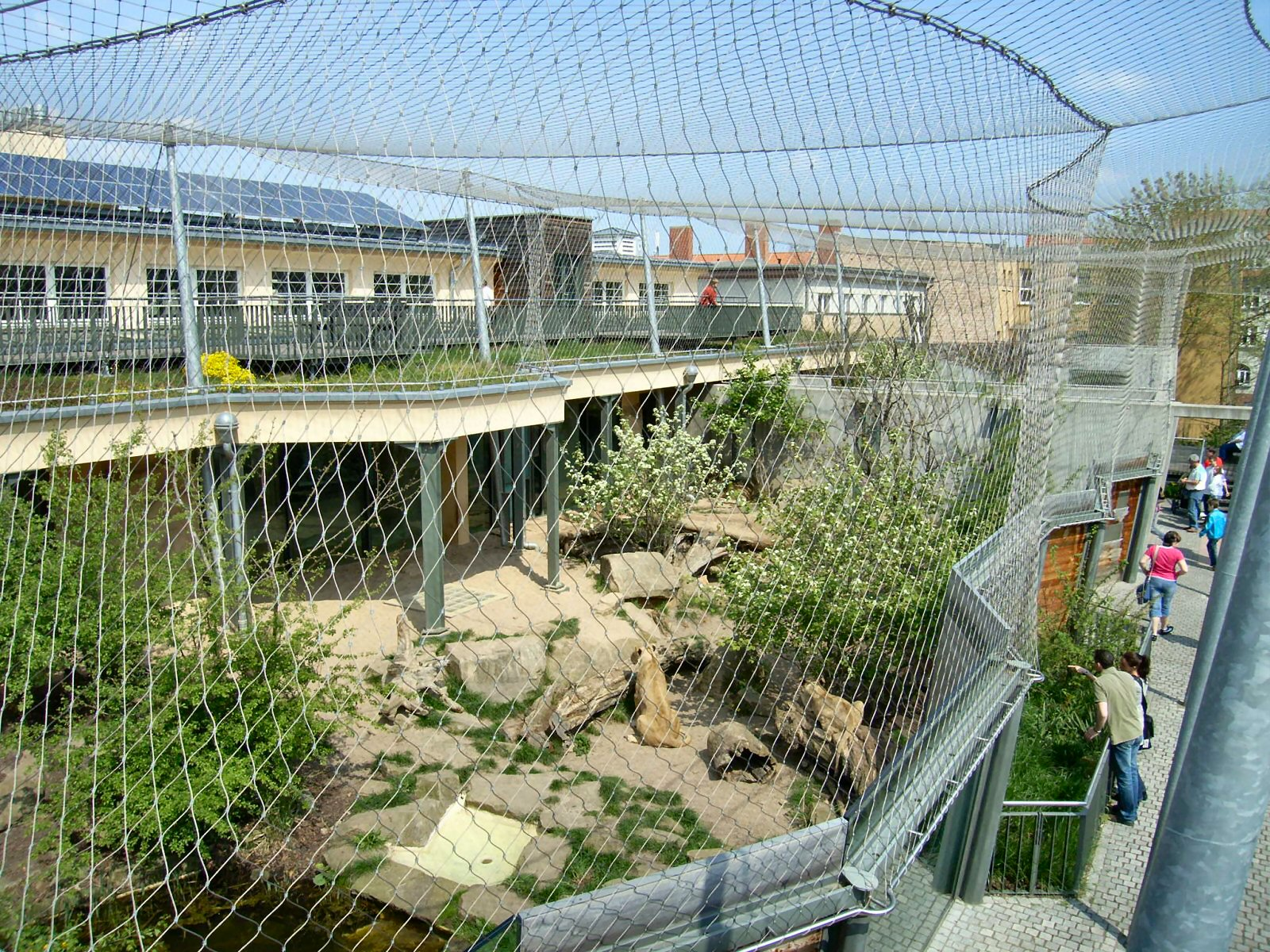 Zoologischer Garten Halle (Saale),Raubtierhaus